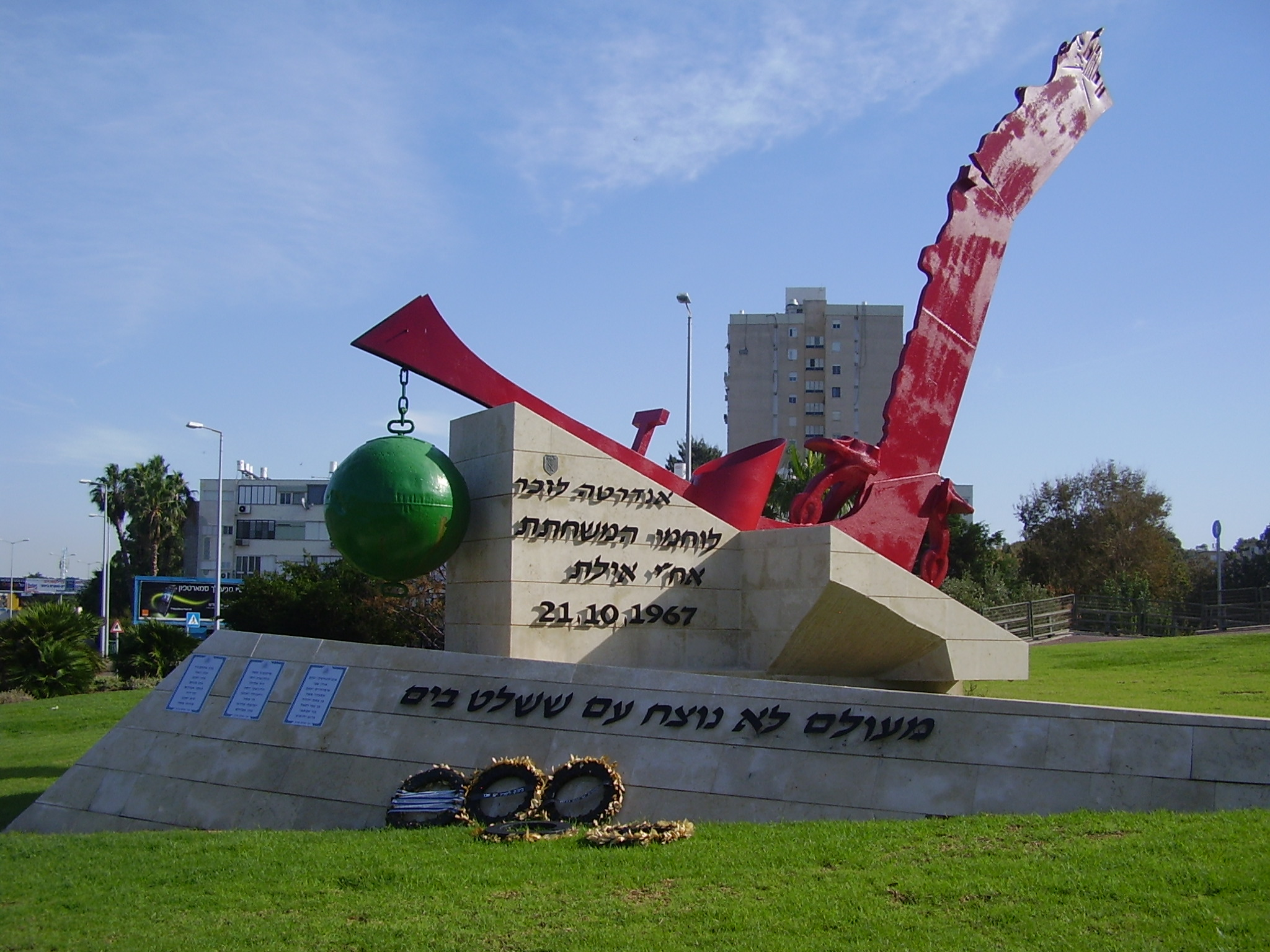 Sculpture